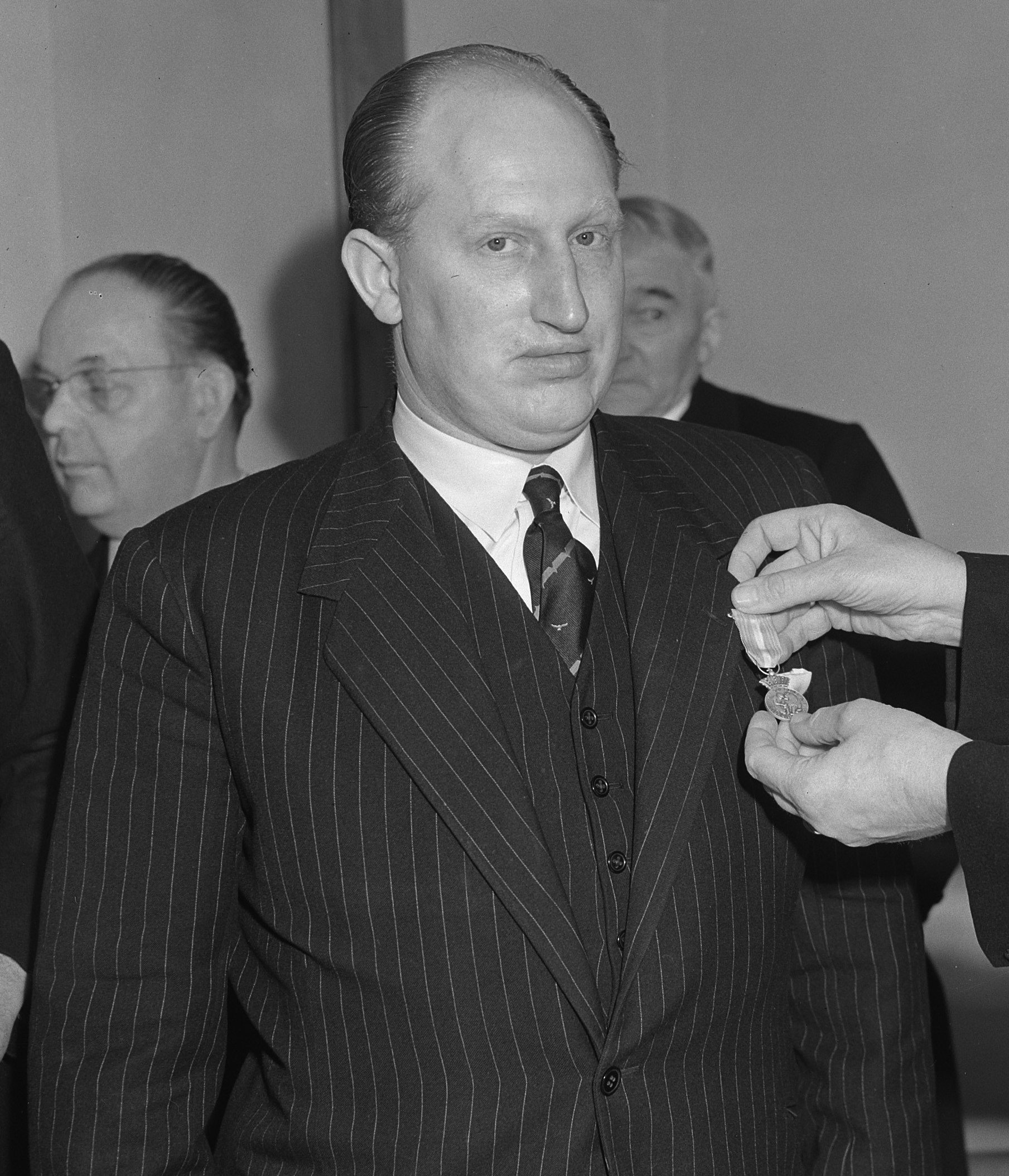 Collectie / Archief : Fotocollectie Anefo Reportage / Serie : [ onbekend ] Beschrijving : Uitreiking onderscheidingen door Richard Pape (voormalig navigator Royal Air Force en schrijver van "Boldness be my friend") Datum : 18 maart 1954 Trefwoorden : onderscheidingen, tweede wereldoorlog Persoonsnaam : Pape, Richard Fotograaf : Rossem, Wim van / Anefo Auteursrechthebbende : Nationaal Archief Materiaalsoort : Glasnegatief Nummer archiefinventaris : bekijk toegang 2.24.01.09 Bestanddeelnummer : 906-3450